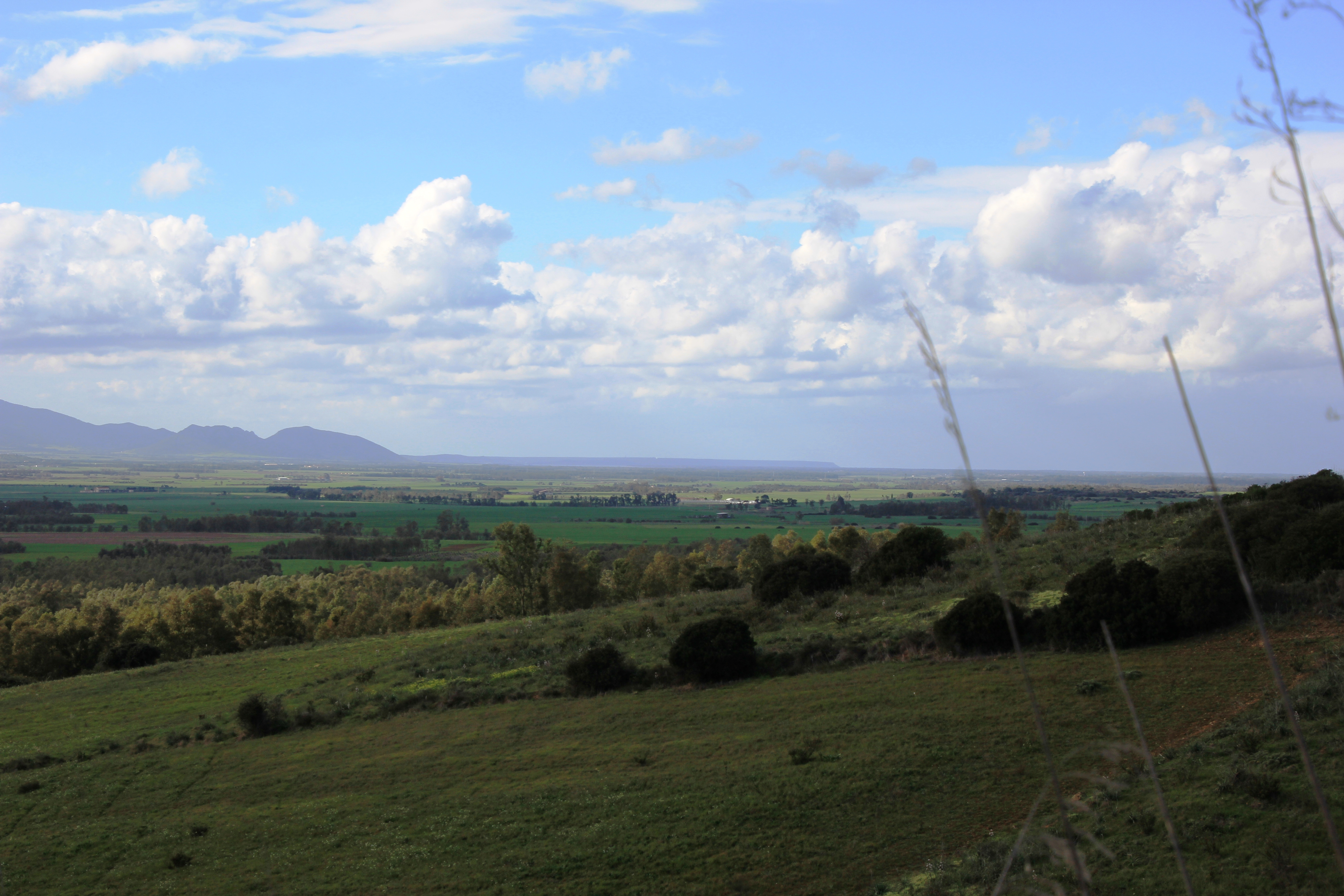 Campidano di Oristano